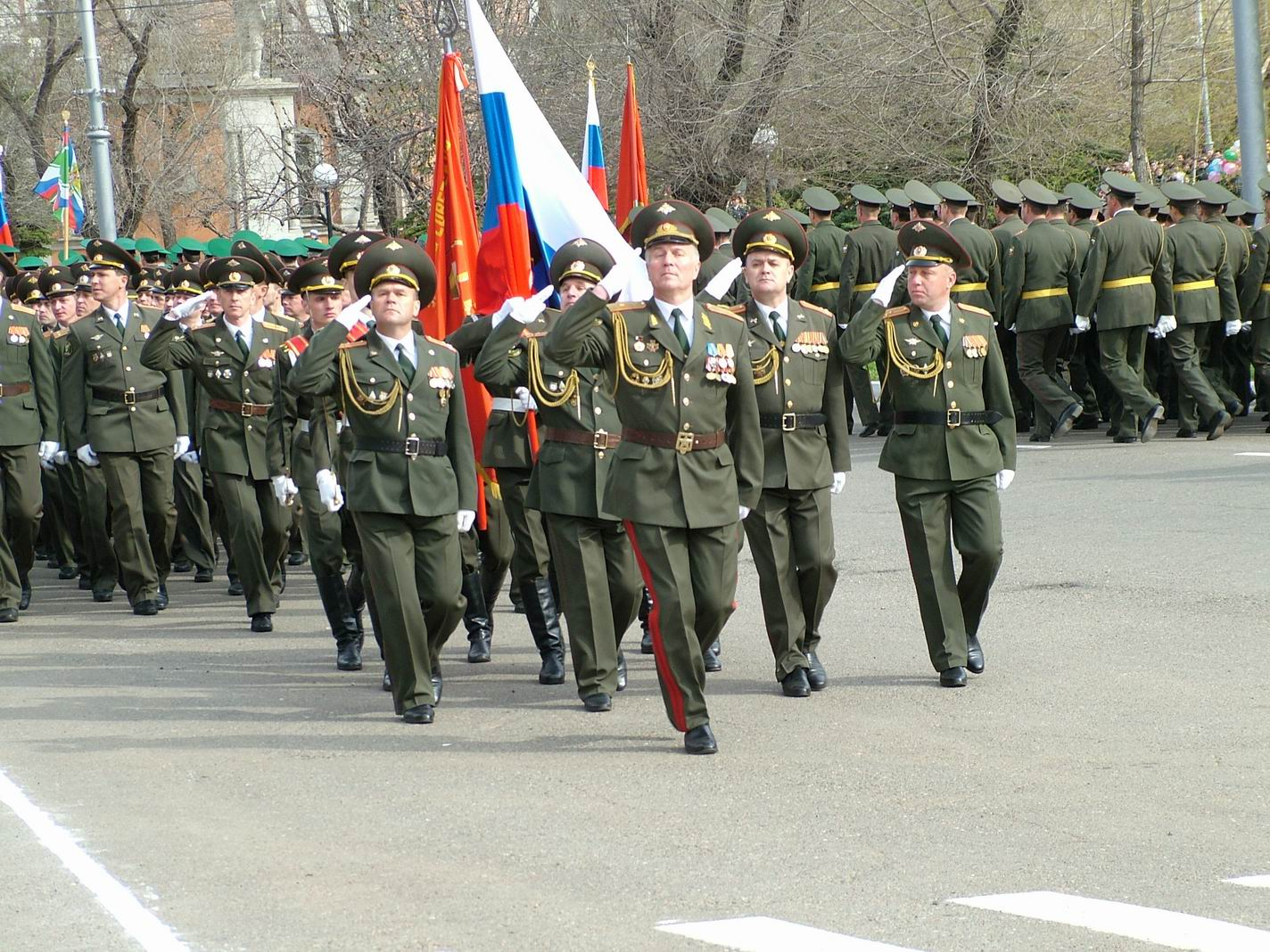 Парад в Оренбурге, 2008